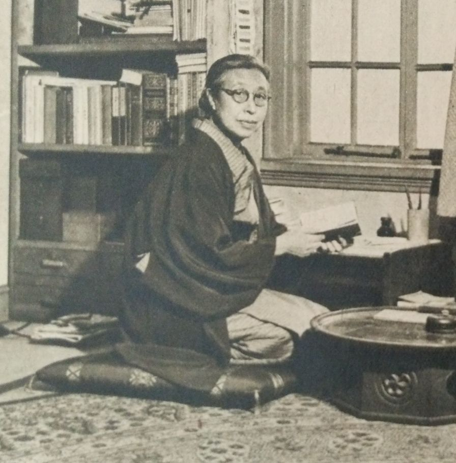 平塚らいてう